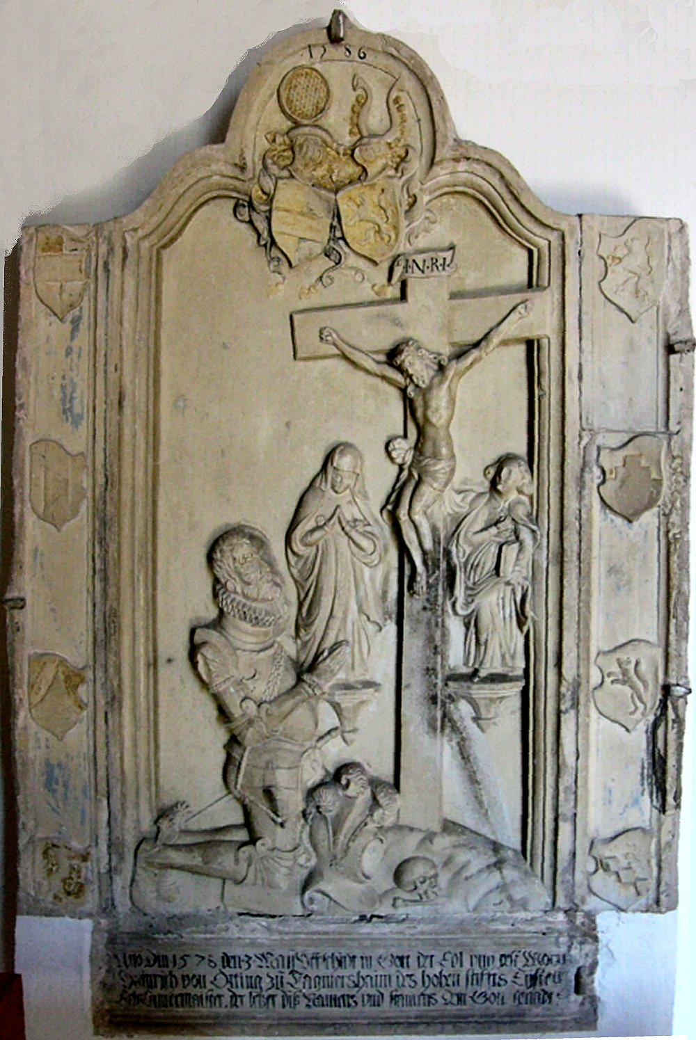 Epitaph des letzten von Otting in Tagmersheim in der Pfarrkirche St. Jakobus: Moritz Heinrich von Otting von 1578